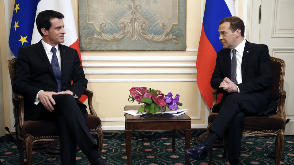 Беседа Дмитрия Медведева с Премьер-министром Франции Мануэлем Вальсом